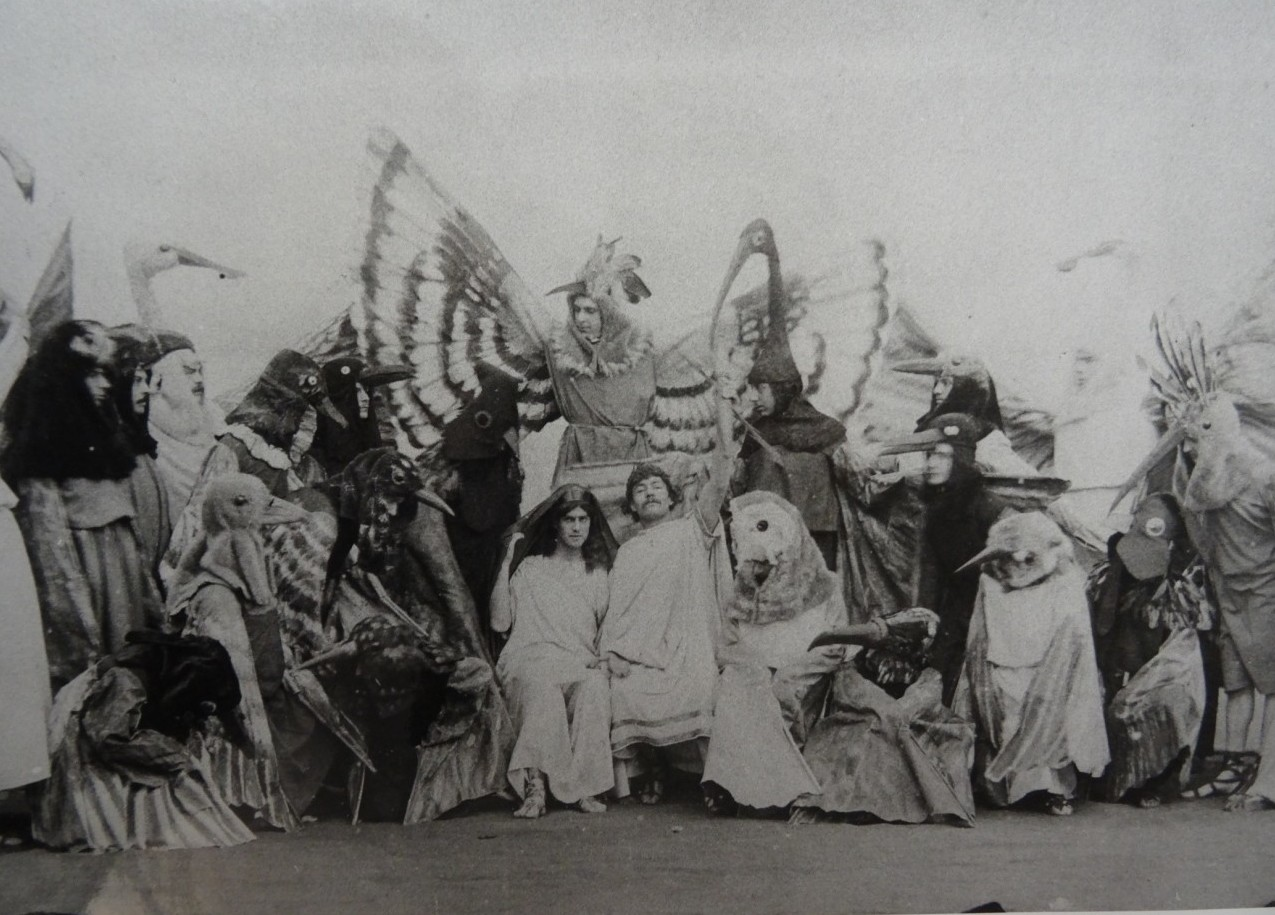 Whole Cast The Birds of Aristophanes Cambridge, November, 1883